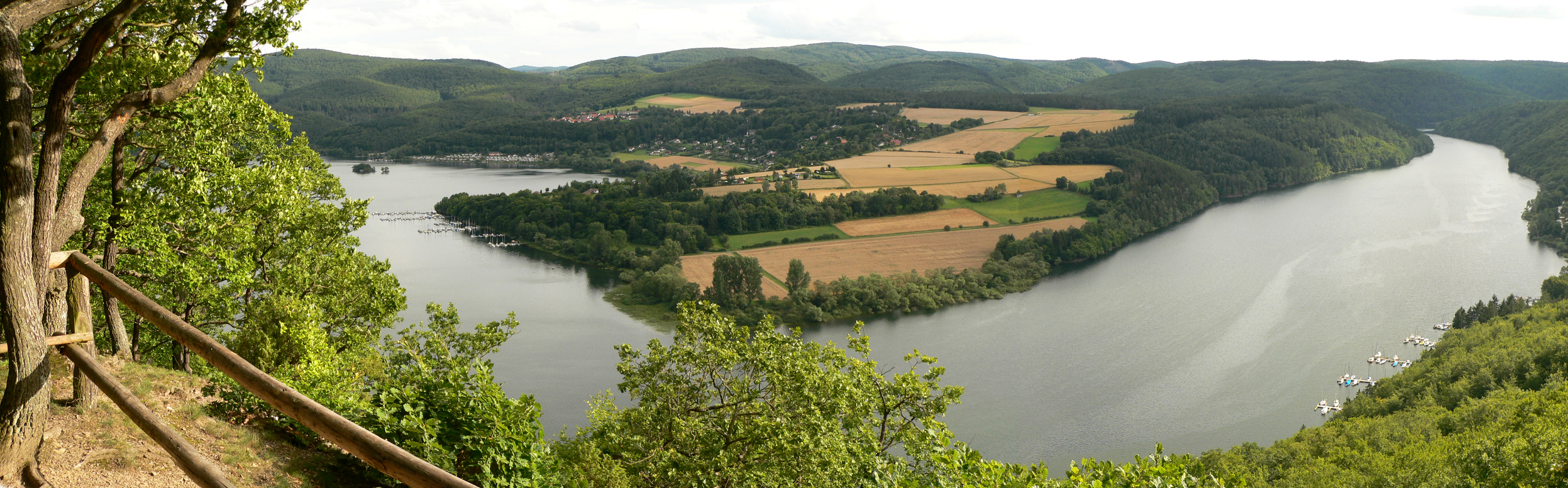 Blick vom Aussichtspunkt Schöne Aussicht an einem Rundwanderweg des Urwaldsteiges